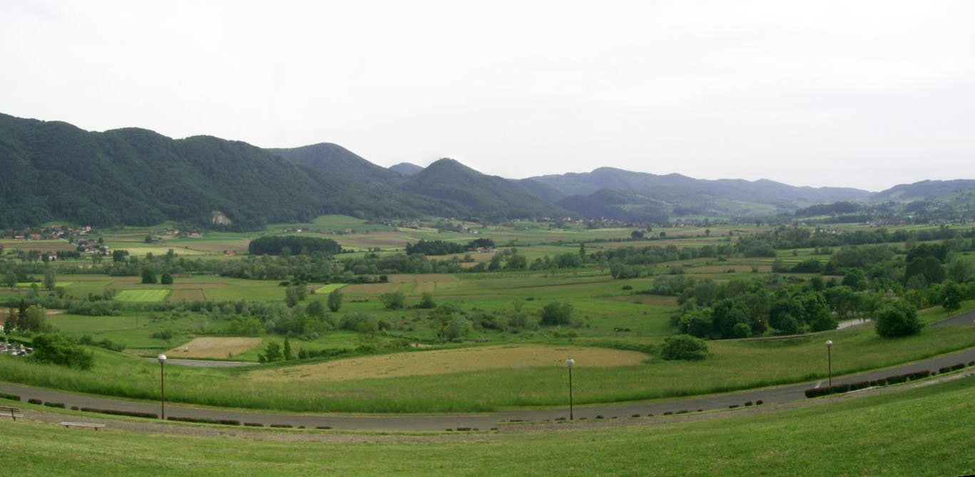 Pogled na dolinu Sutle iz Kumrovca, Hrvatska (ex-Politička škola) prema Sloveniji